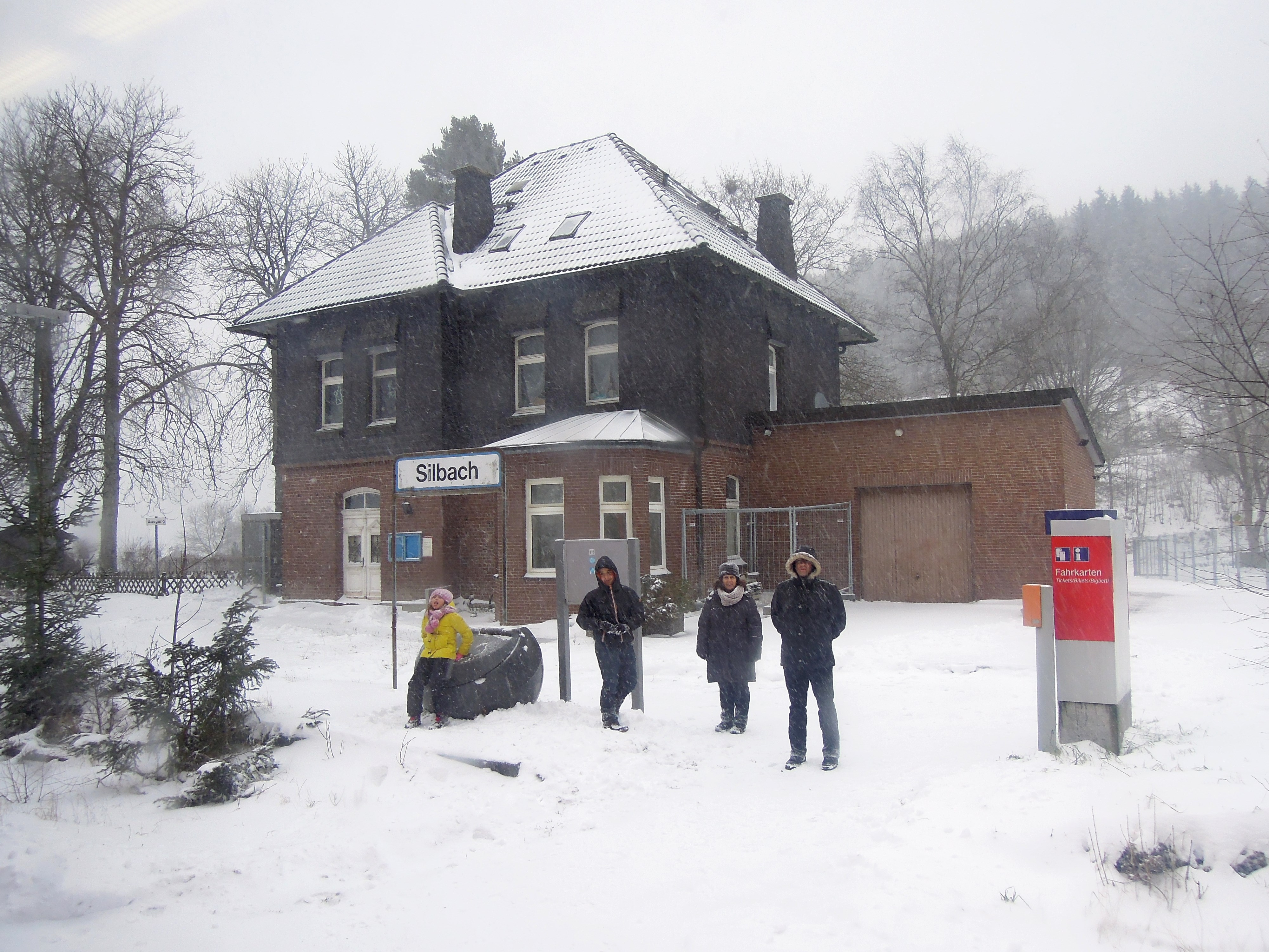 Bahnhof von Silbach im Winter mit Touristen im Vordergrund.